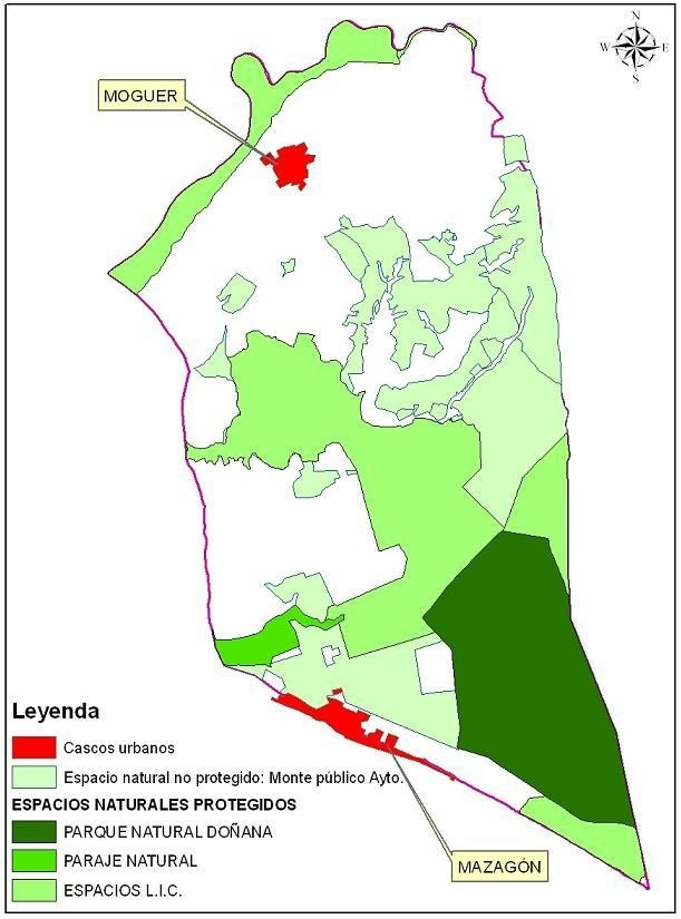 Plano de distribución espacios naturales en el término municipal de Moguer (España).